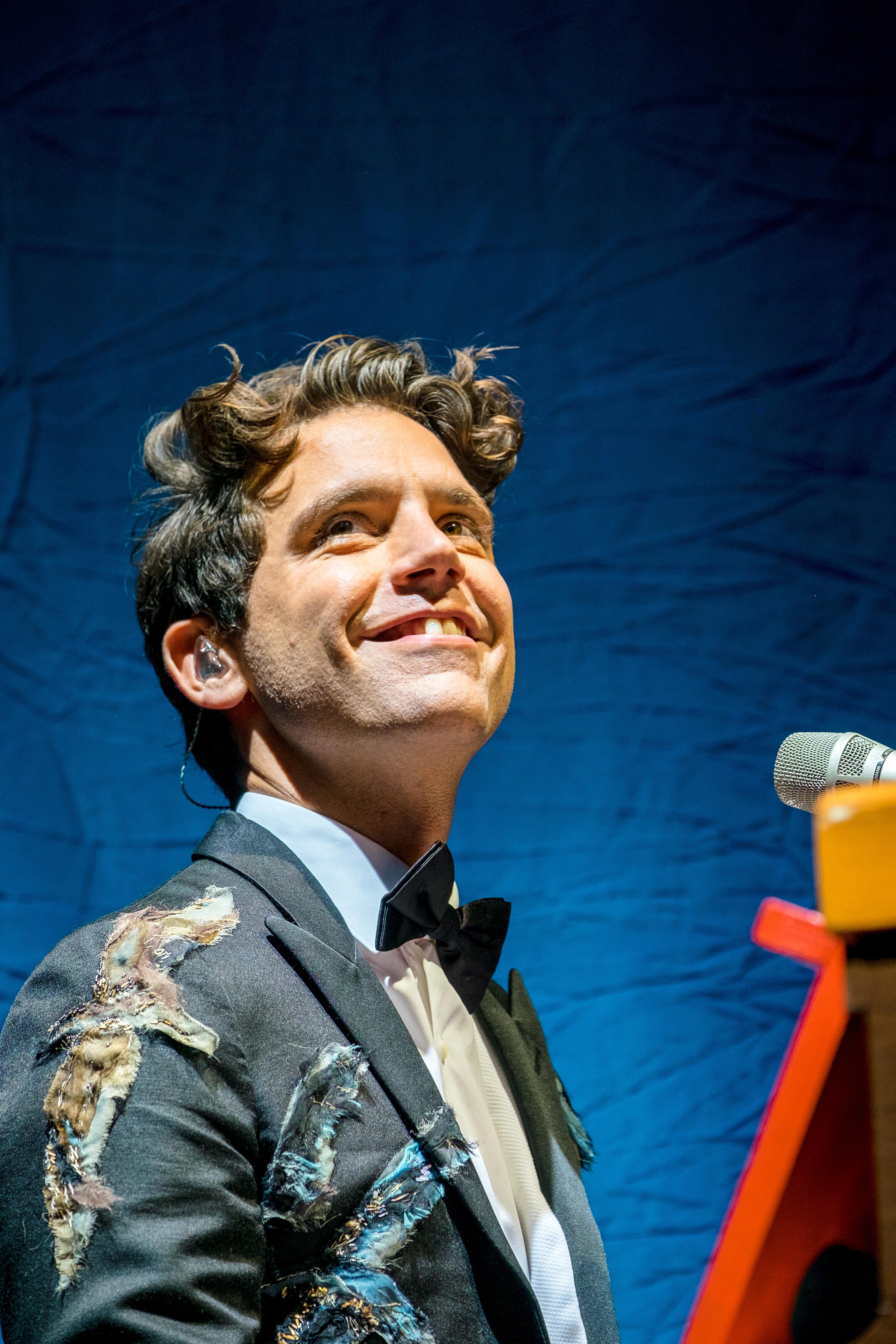 MIKA show Riga 2016